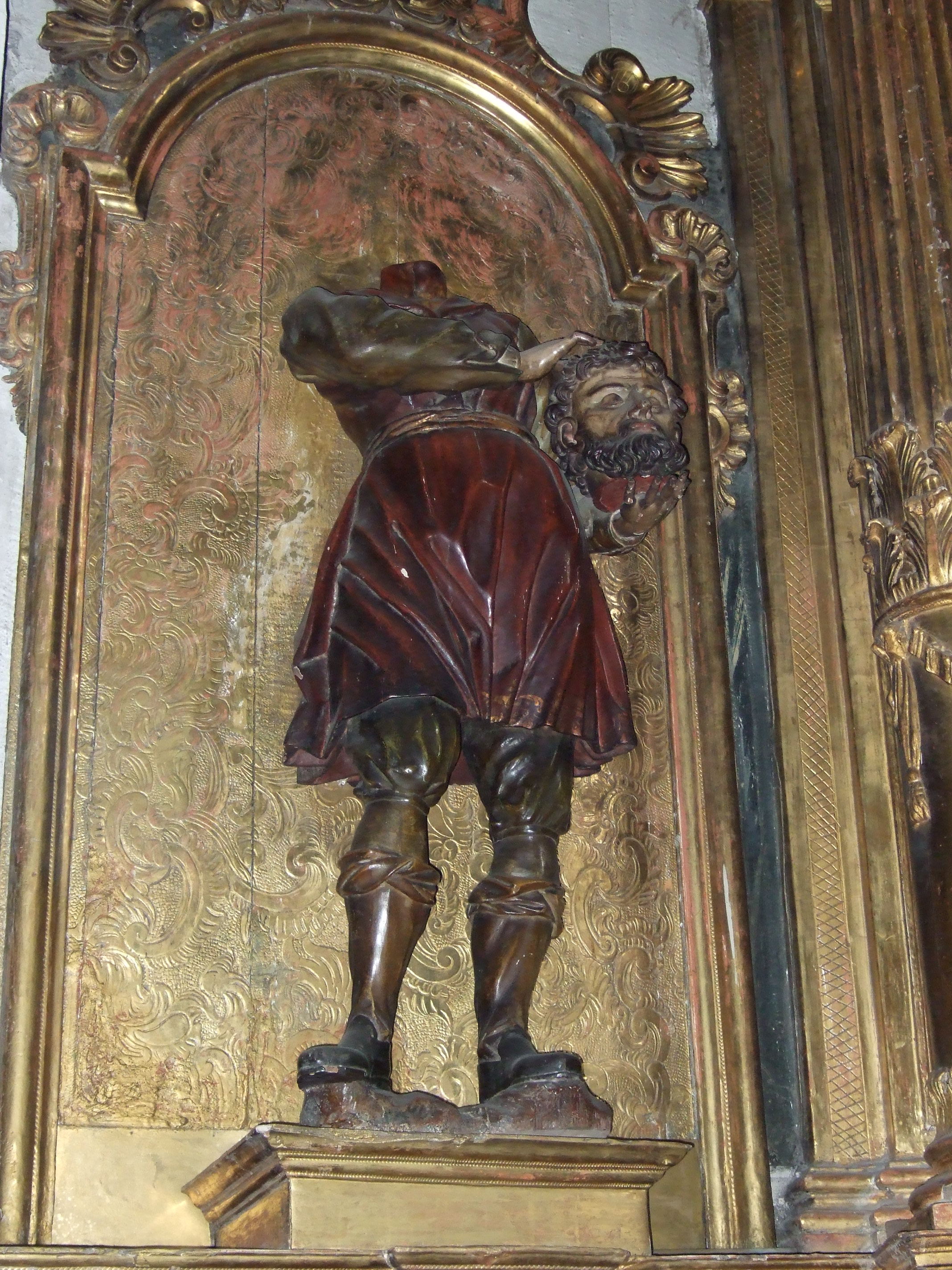 Zaragoza - Iglesia de San Pablo - Escultura de San Lamberto